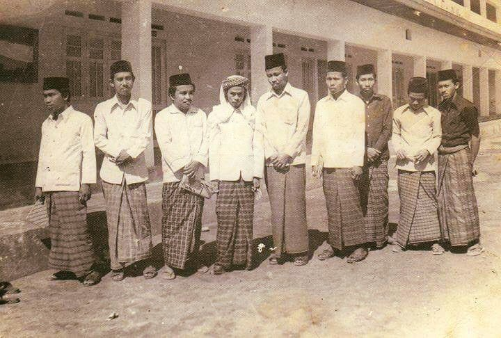 كياي والمعلم أمام المدرسة بمعهد سلفية شافعية أندوبيسية